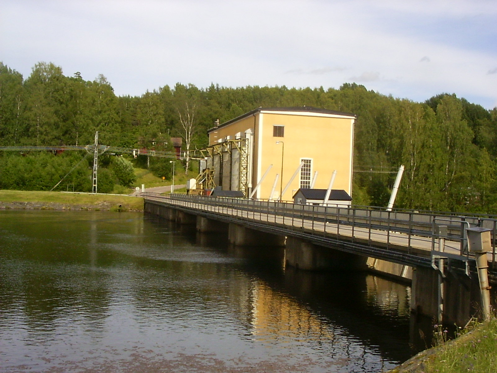 Södra Skoga, waterkrachtcentrale in de Klarälv